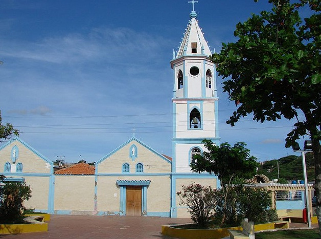 Inmaculado Corazon de Maria-Carirubana